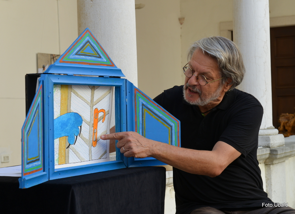 Piran, Križni hodnik 2017